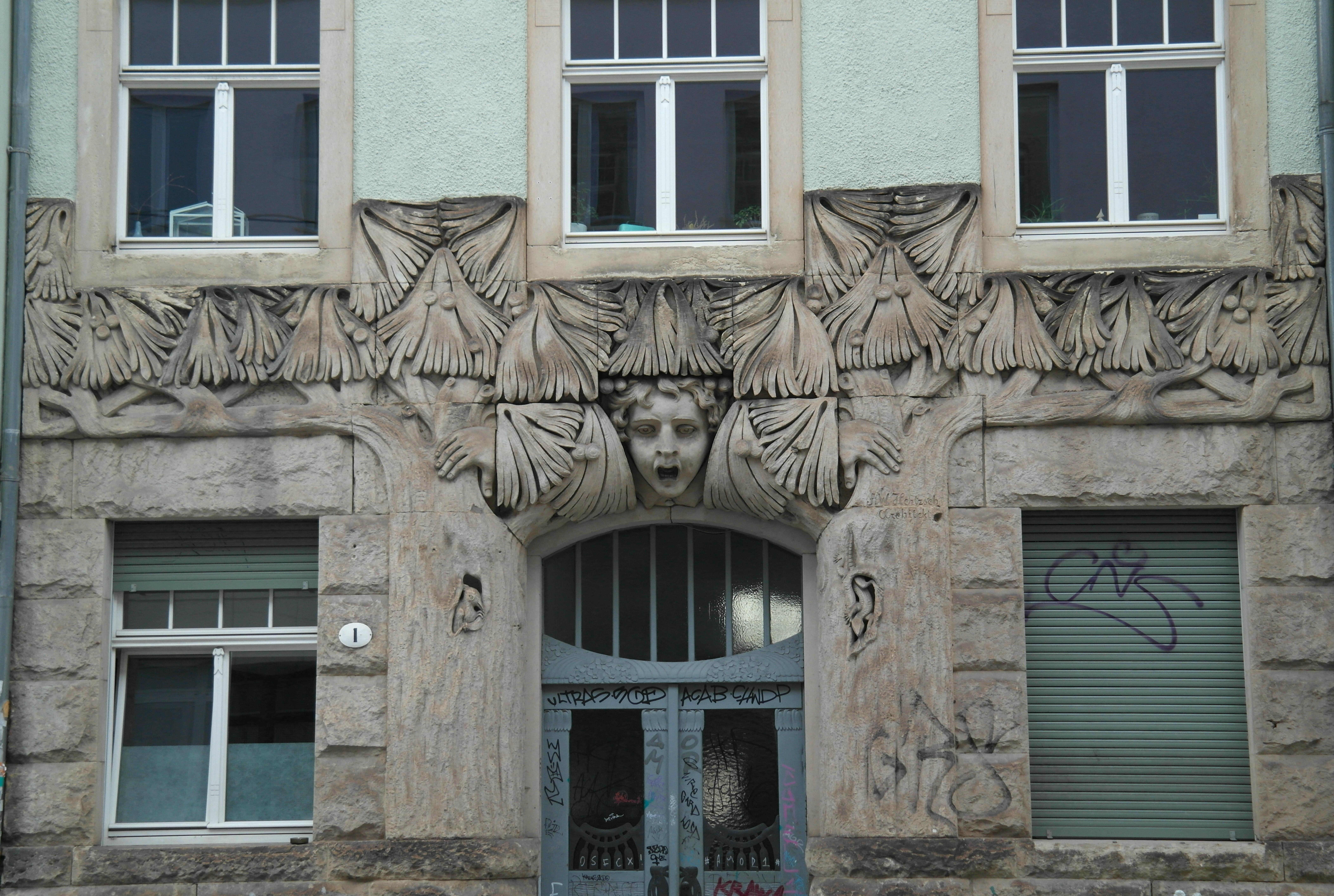 Dresden, Katharinenstrasse1, Eingangsportal vom Dresdner Bildhauer Eduard Jungbluth